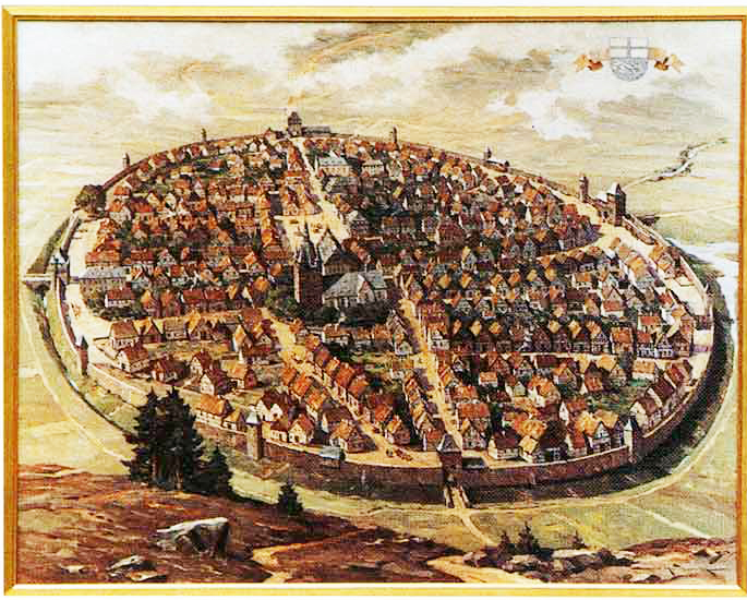 Brilon mit Quartalen und Stadtbefestigung um 1720